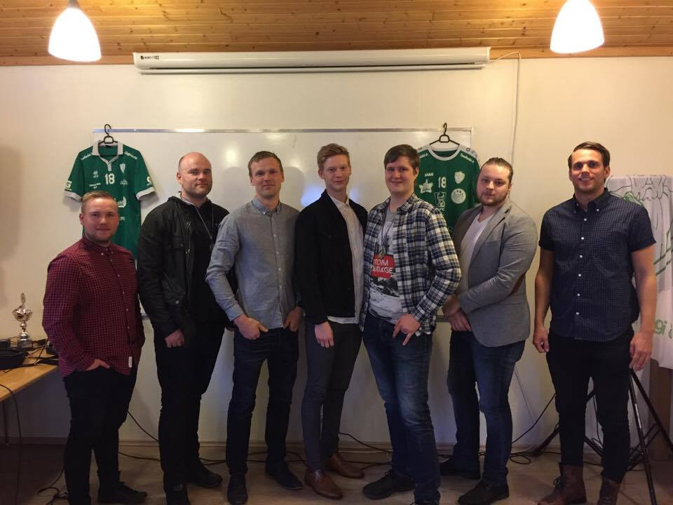 Verðlaunahafar á lokahófi 2017